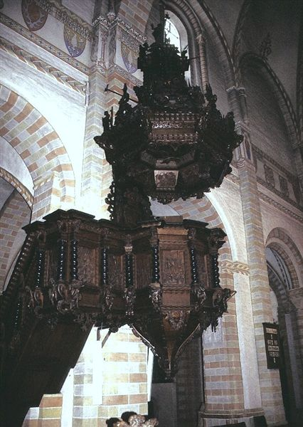 Sorø Klosterkirke